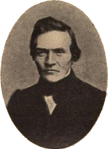 Den norske redaktøren og arkivaren Paul Botten-Hansen (1824–1869).